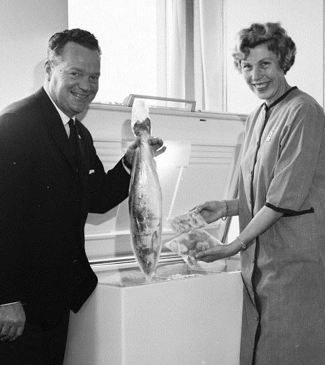 mann, direktør i Dypfrysningskontoret, kvinne, fryseboks, matvarer. Rigmor Dahl Delphin (1908-1993) var ansatt som fotograf i ukebladet Alle Kvinner. Hennes negativarkiv ble i 2005 overført Oslo Bymuseum fra Gyldendal Norsk Forlag som var utgiver av bladet.